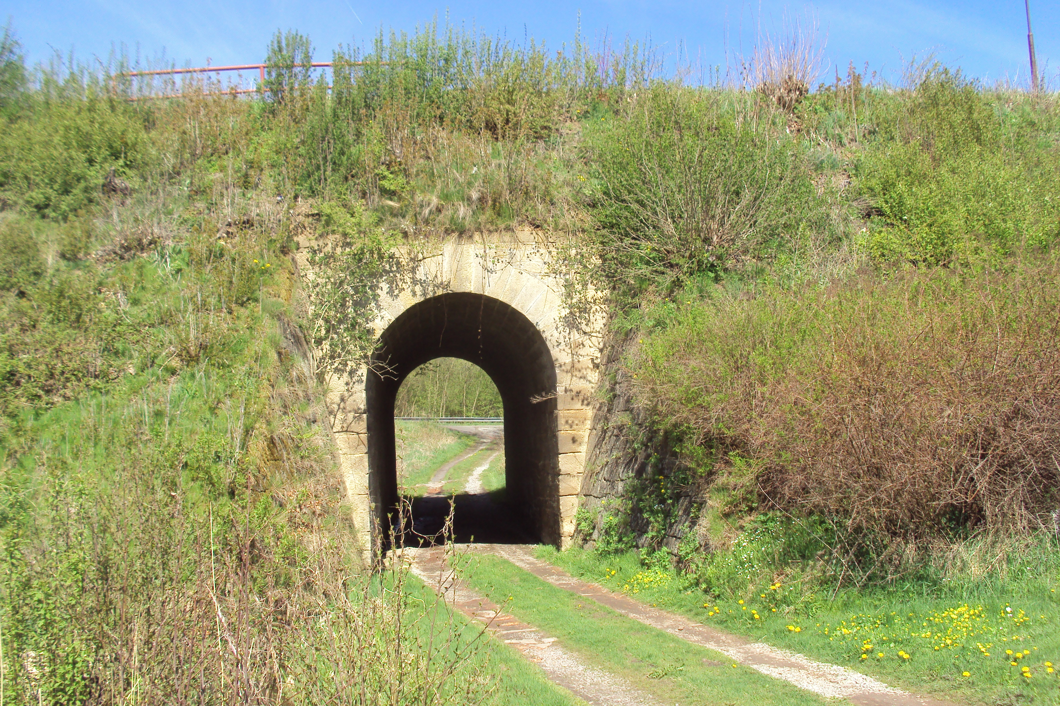 Most pod cestou, kde kdysi vedla železnice k cukrovaru v Nových Zákupech